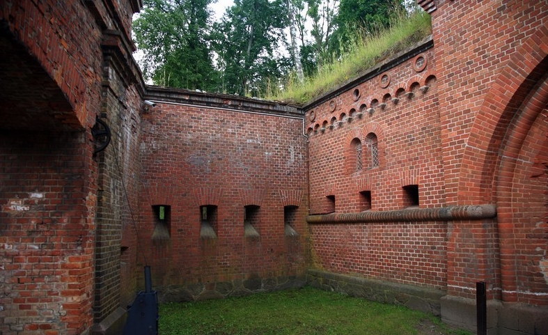 Giżycko, Twierdza Boyen